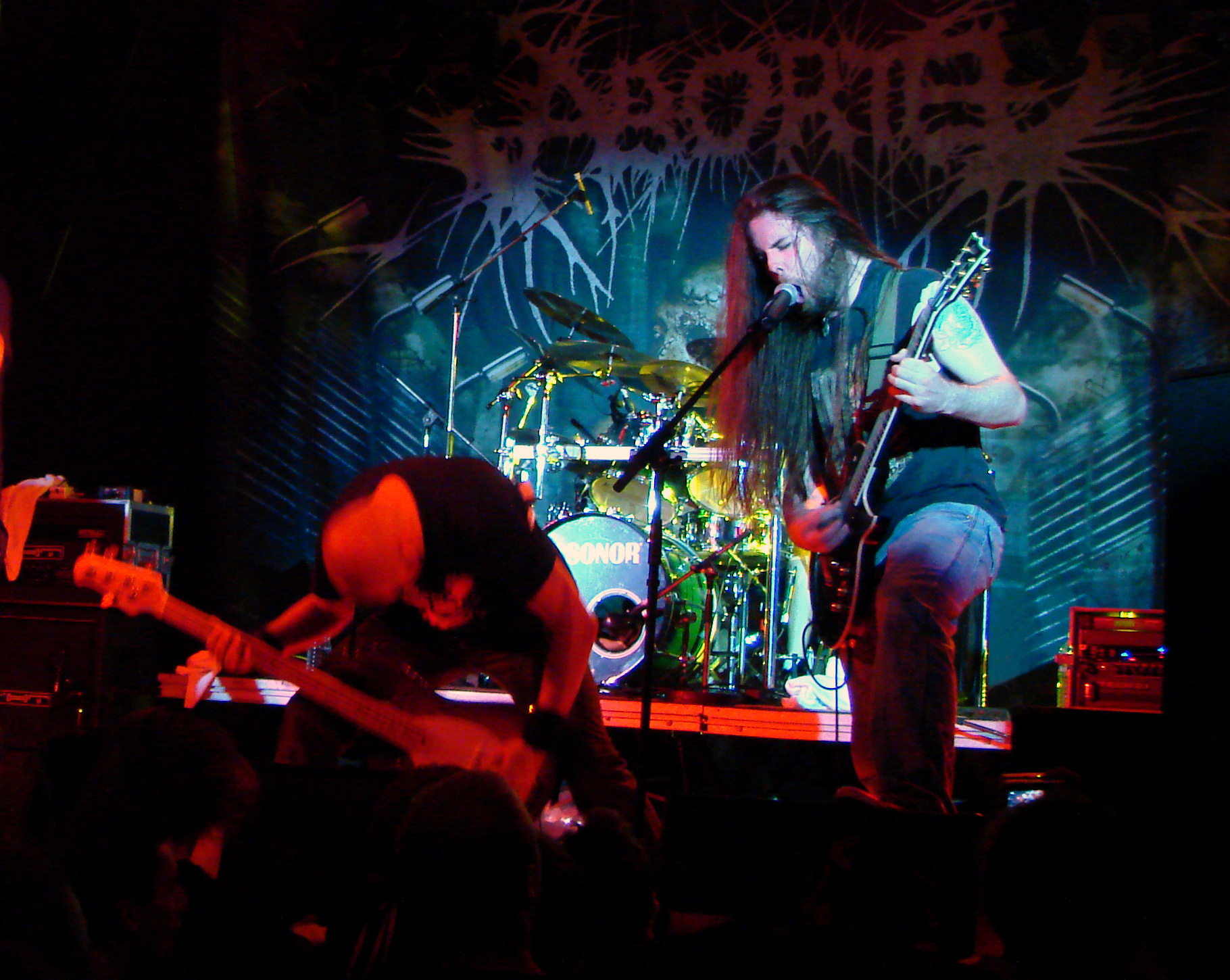 Aborted au Coolness'tival 2007, le 3/11/07 à Montdidier (60).